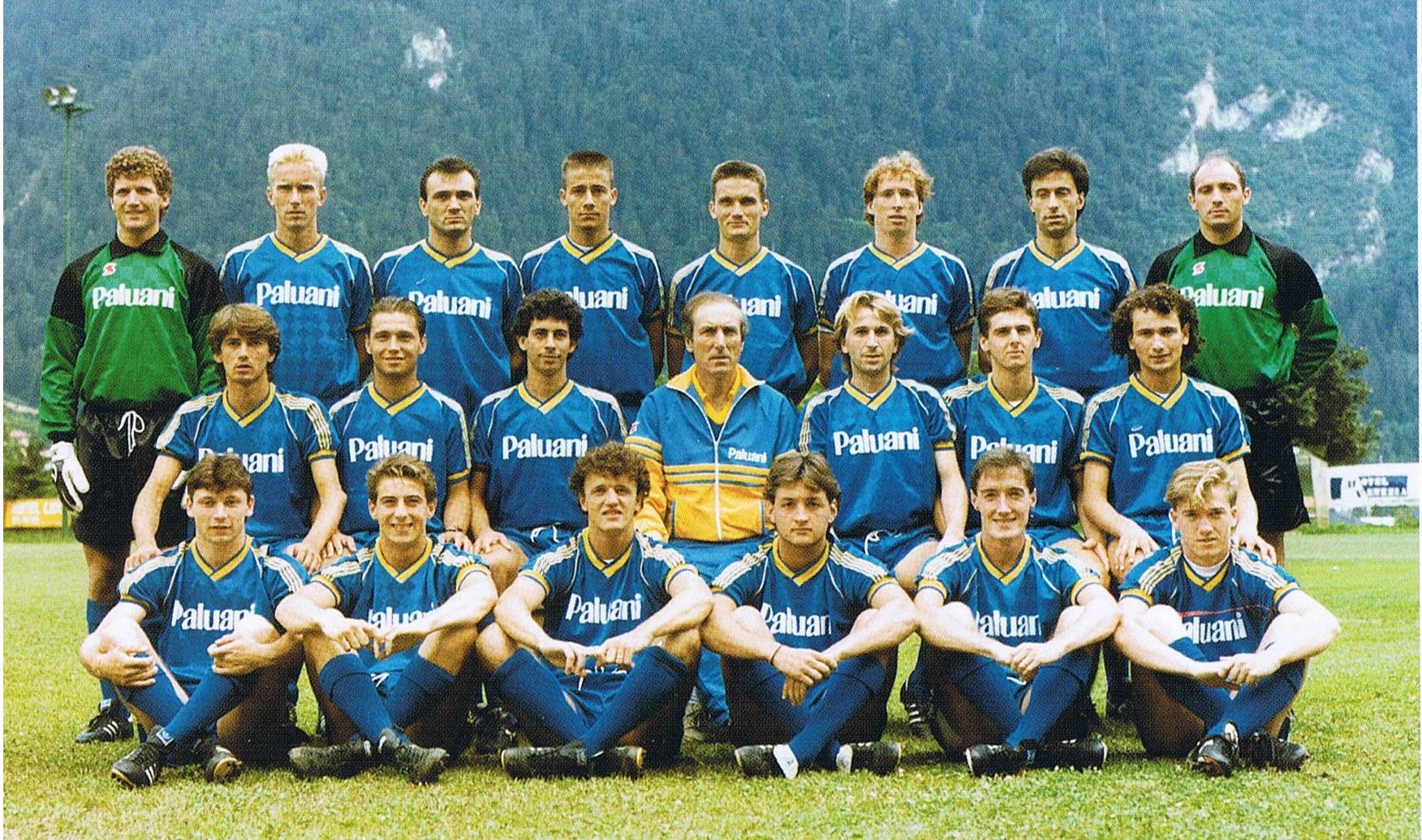 chievo 88-89